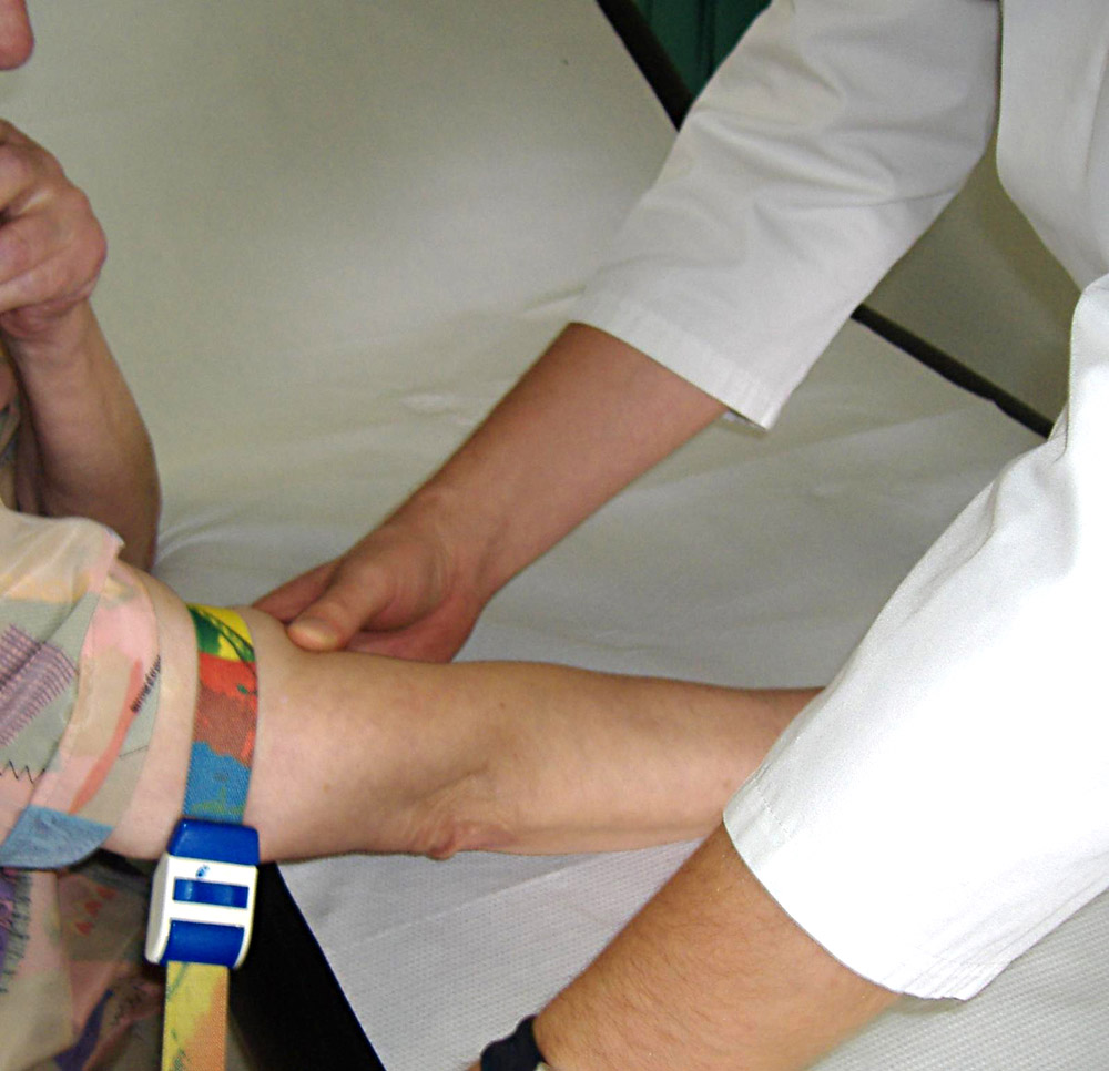 Anlegen eines Stauchschlauches zur venösen Punktion am Arm - Use of a Tourniquet before an venous puncture